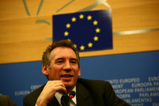 François Bayrou à Strasbourg le 12 fevrier 2007